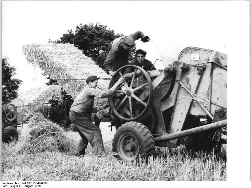 Ossendorf, Reparatur einer Presse Zentralbild Seliger Se-Ga 8.8.1960 Hochbetrieb auf den Feldern unserer RepublikGegenwärtig werden von den Genossenschaftsbauern alle Reserven eingesetzt, um den Zeitverlust bei Einbringung der reichen Ernte wieder auszugleichen. Jetzt muß sich die festgelegte Zusammenarbeit zwischen LPG Typ I, Typ III und MTS bewähren.Eine der LPG, die erfolgreich den Tempoverlust aufholt, ist die Genossenschaft vom Typ I "Vorwarts" in Ossendorf, Kreis Fürstenberg-Oder, Bezirk Frankfurt-Oder. Unter Anleitung des jungen Bürgermeisters Locher wetteifern die Bauern um die schnell Ernteeinbringung und sind außerdem noch dabei, die genossenschaftlichen Viehbestände aufzubauen.UBz: Sofortreparatur auf den Erntefeldern. Eine fliegende Reparaturbrigade der MTS Ossendorf, Kreis Fürstenberg-Oder ist bei kleineren Reparaturen sofort zur Stelle. Hier wird eine Pick-up-Presse instand gesetzt.